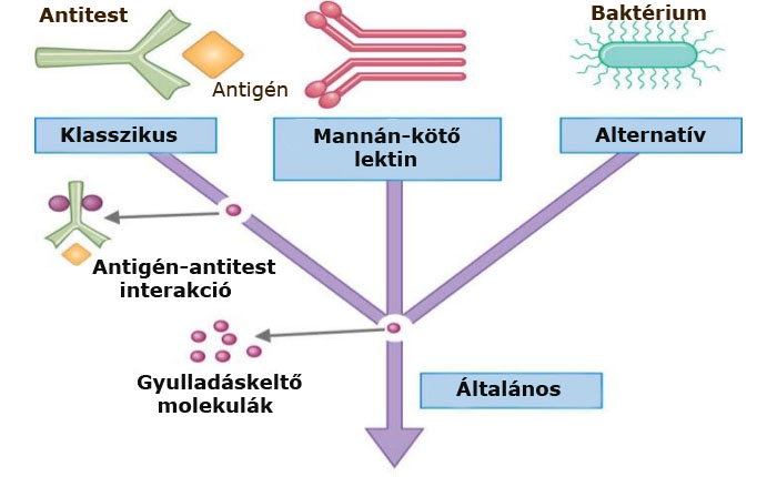 Komplement útvonalak